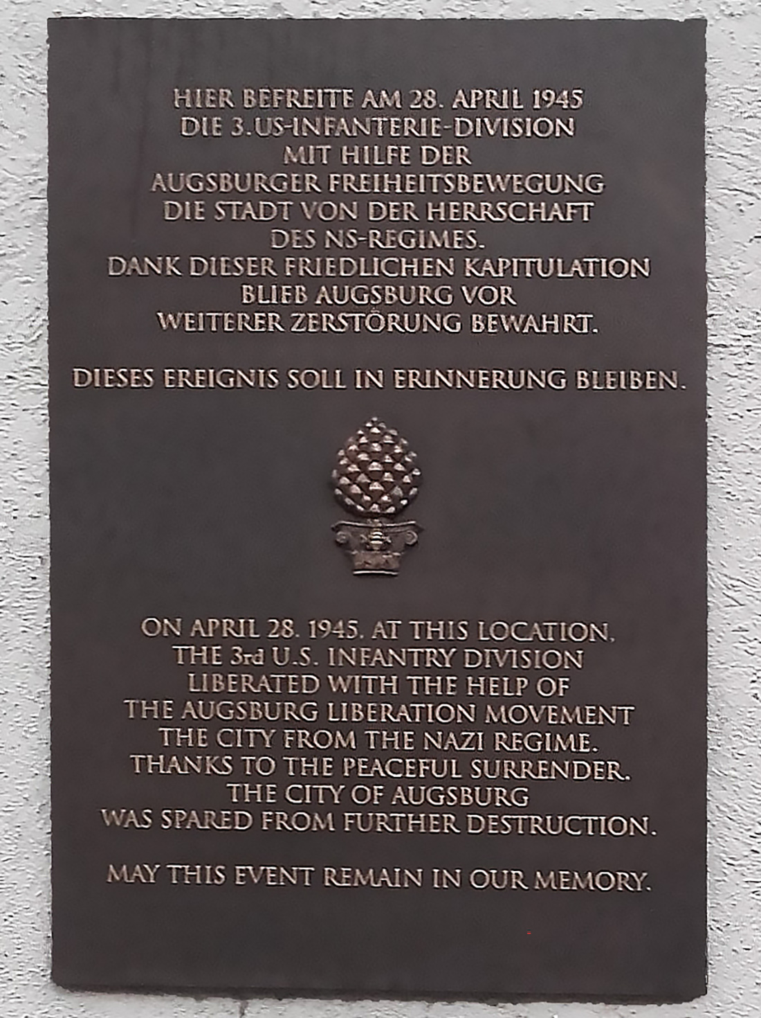 Gedenktafel zur Kapitulation Augsburgs, am Stadtwerkehaus angebracht.